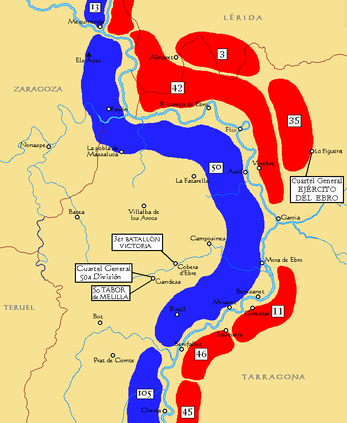 Mapa con la distribución de fuerzas durante la Batalla del Ebro. Las bolsas de color rojo equivalen a divisiones del Ejército Popular con su denominación oficial. Las bolsas de color azul equivalen a las divisiones del Ejército Franquista con su denominación. Los cuadros que aparecen se refieren o bien a presencia de un Estado Mayor o de una unidad militar independiente.